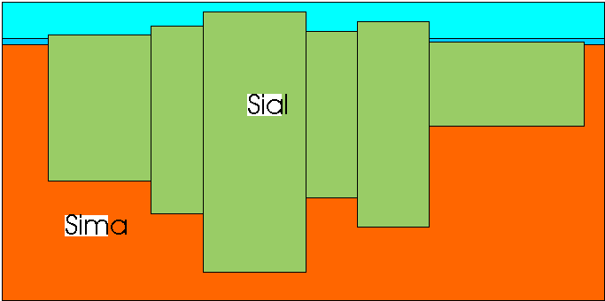 Esquema del funcionamiento de la isostasia.